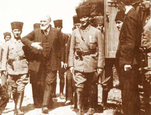 Gazi Mustafa Kemal Paşa, İzmit'te Fransız yazar Claude Farrère'i karşılarken